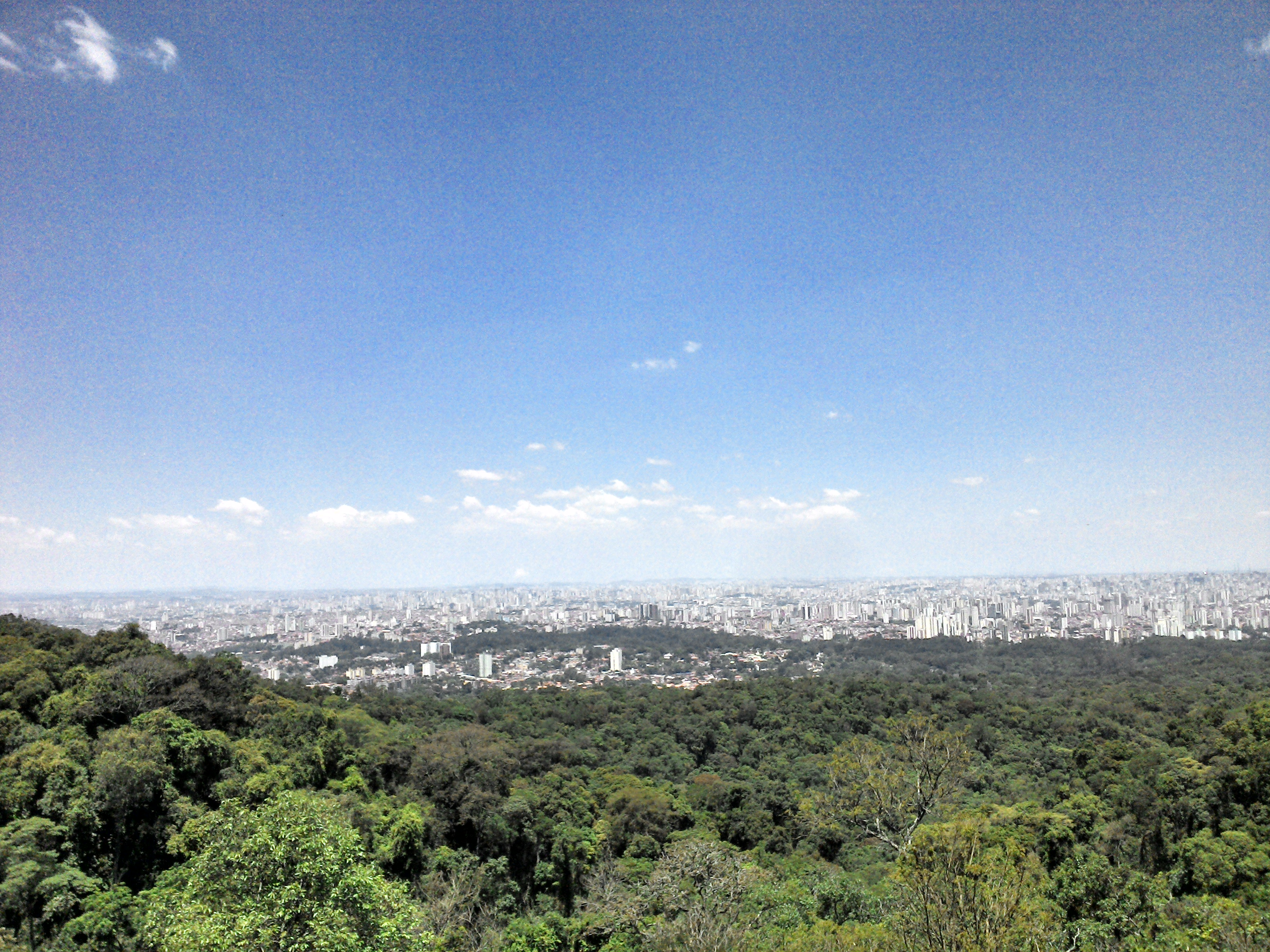 Português do Brasil: Vista da Pedra Grande, no Parque da Cantareira